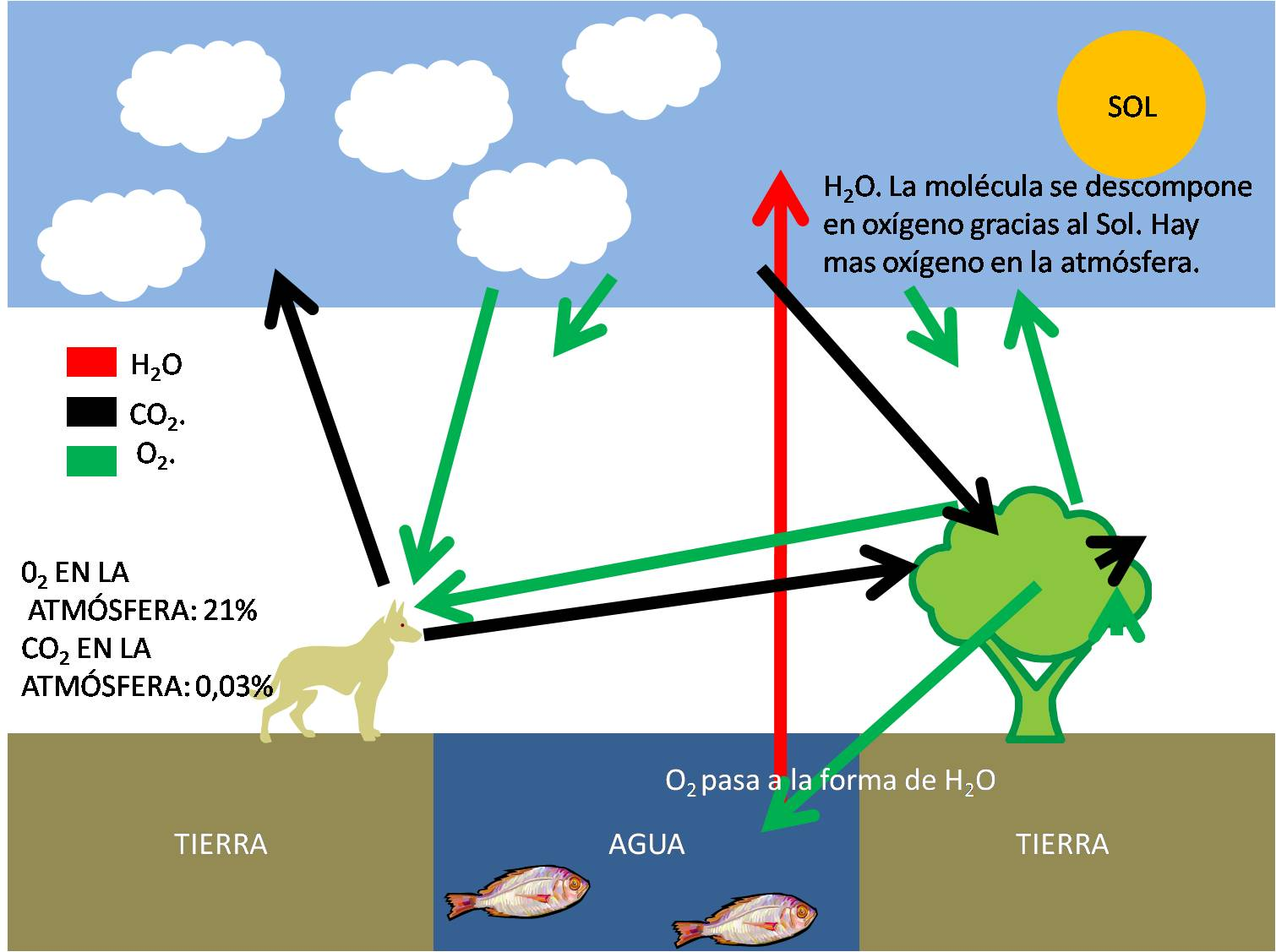 Flujo del oxígeno